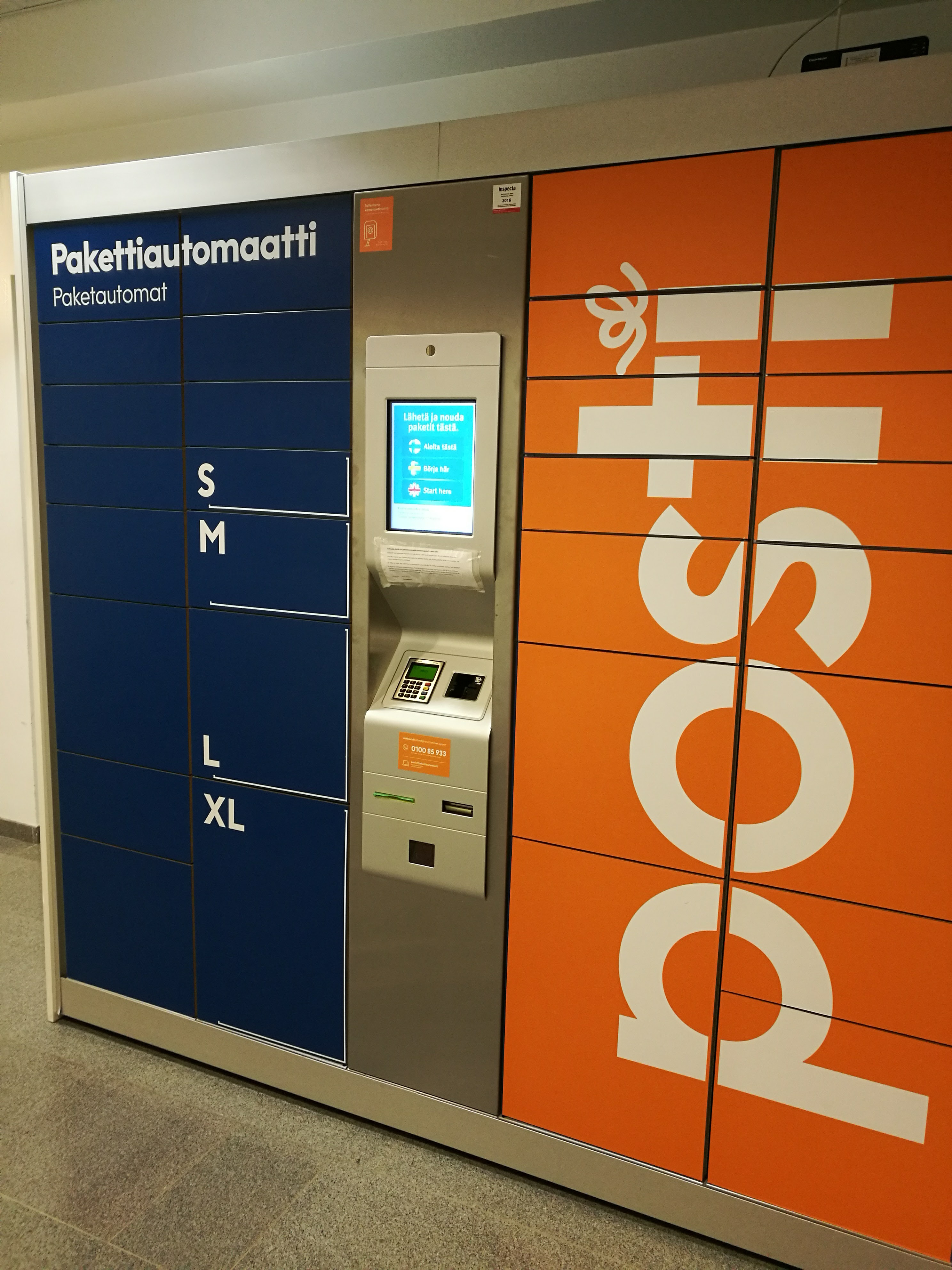 SmartPost-pakettiautomaatti Helsingissä Postintaipaleella.